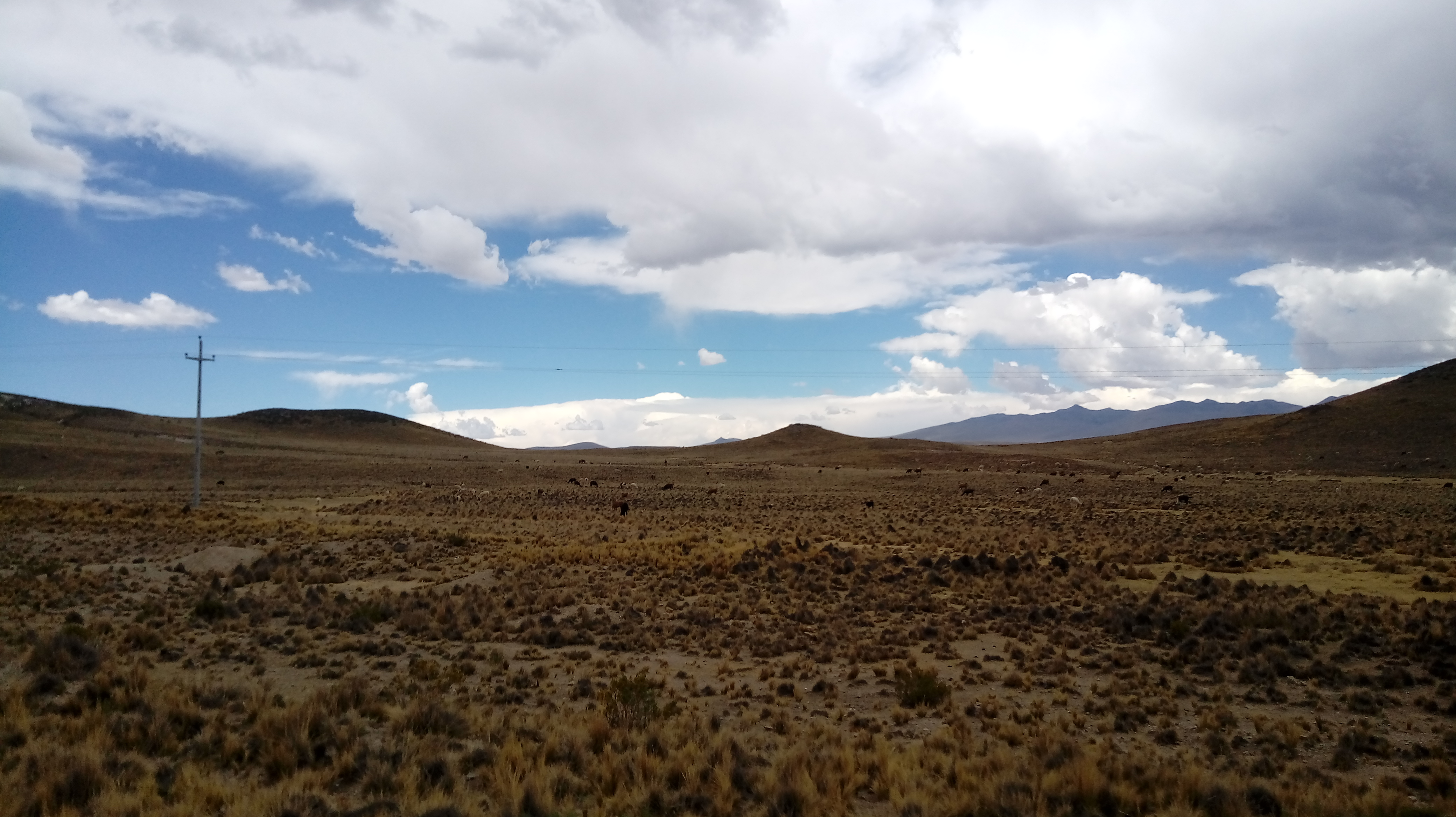 Zona cercana a la carretera entre Mazocruz y la comunidad de Huanacamaya